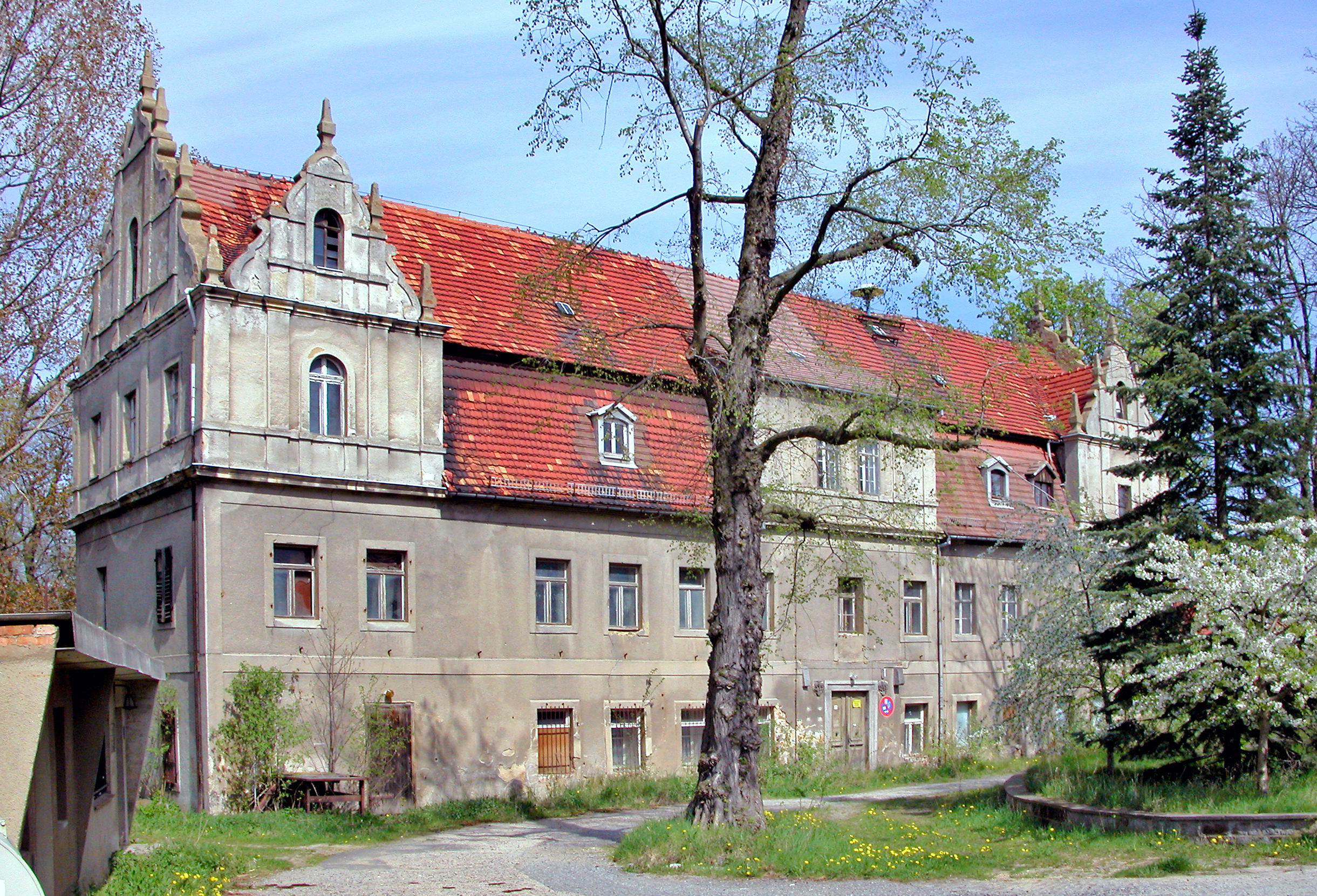 28.04.2008 02708 Bellwitz (Löbau) Alter Schulweg 1 (GMP: 51.127660,14.700404): Schloß Bellwitz, unter derer von Heldreich 1743 erbaut. Die Ziergiebel wurden beim Umbau 1859/60 zugefügt. In der DDR war im Schloß das Gemeindezentrum mit Kindergarten, Lebensmittelgeschäft und einem Kultursaal, außerdem Wohnungen. Nach der Wende privatisiert, Verfall. Südfassade. [DSCN32552.TIF]20080428580DR.JPG(c)Blobelt